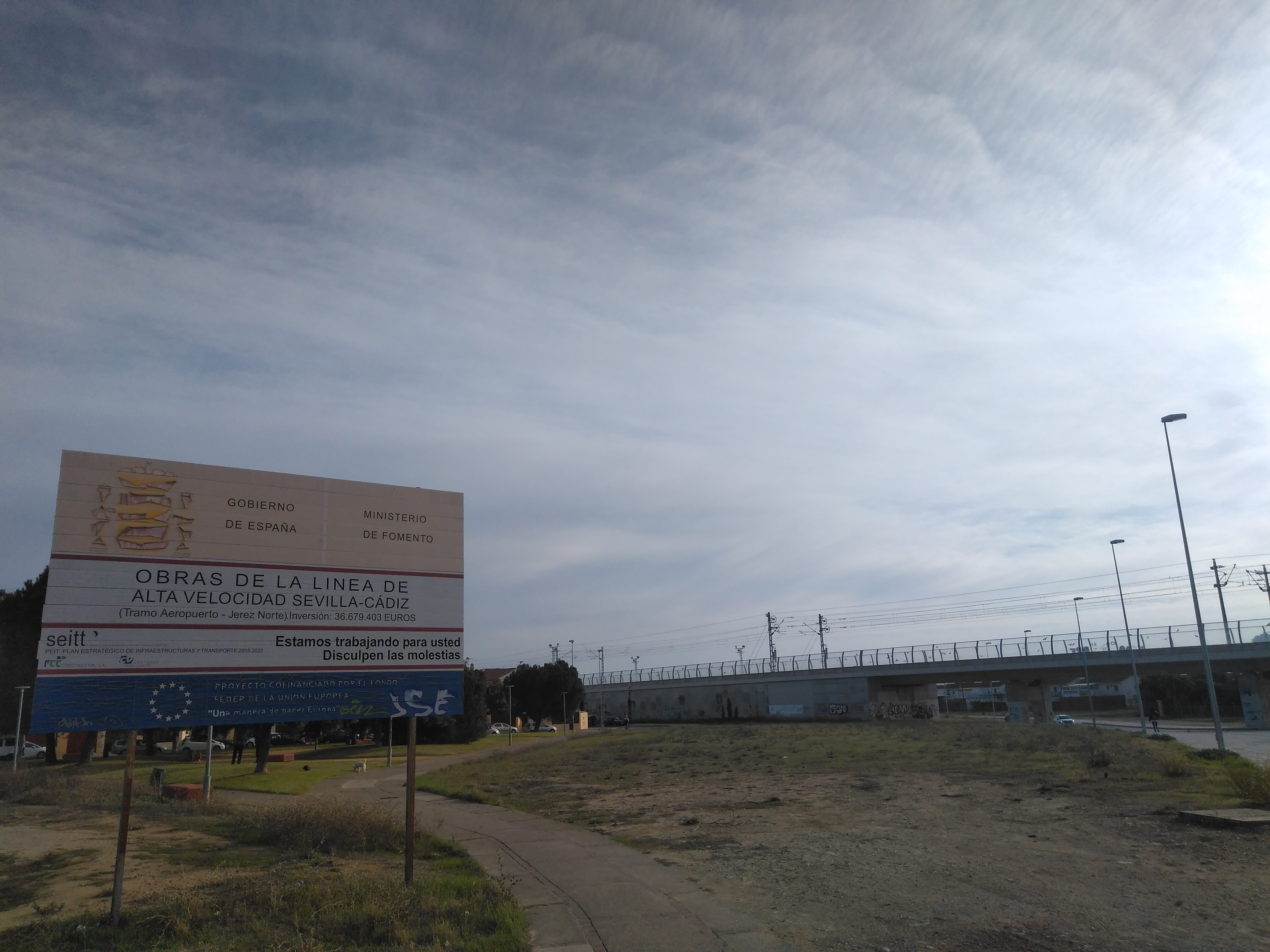 Obras de la línea de alta velocidad Sevilla-Cádiz en Jerez de la Frontera (España)